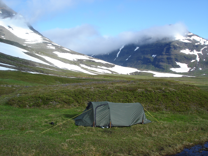 Tältplats under Södra Sytertoppens branta östsida. I fonden Norra Sytertoppen i sitt "morgontäcke"